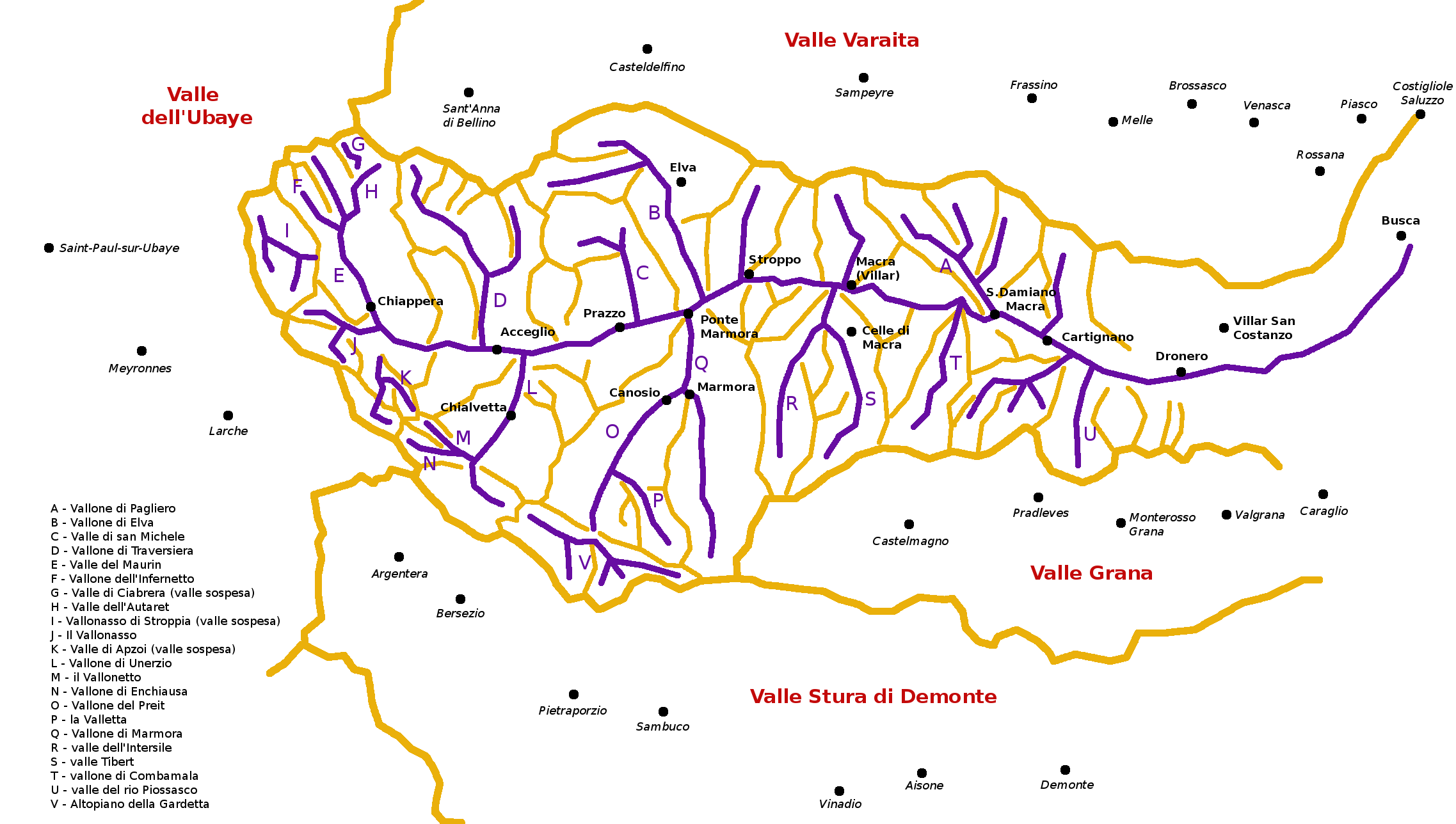 Schema morfologico della val Maira con indicazione delle creste principali (arancione), dei fondovalle (blu) e dei centri abitati (nero)